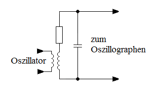 Induktive Kopplung, Schwingkreis, Oszillograph, Dämpfung